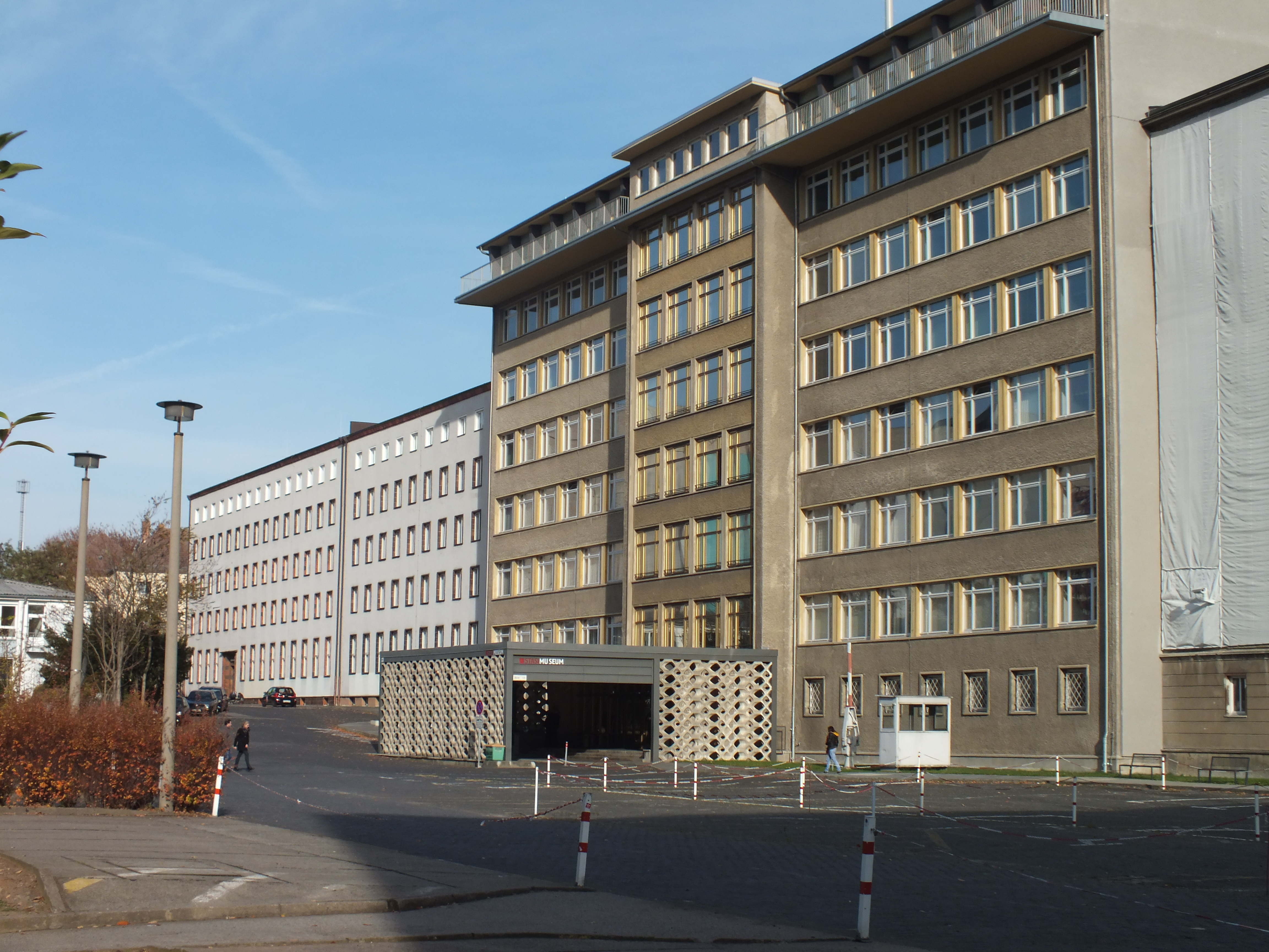 eh. Stasianlage, Haus 1